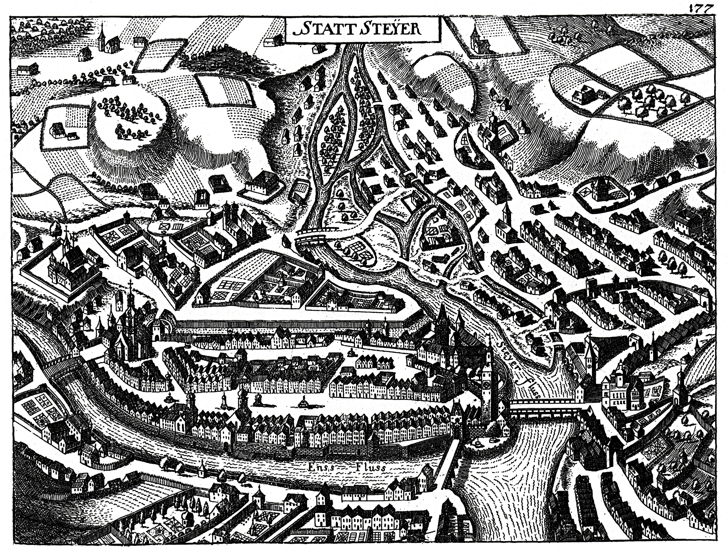 Kupferstich der Stadt Steyr